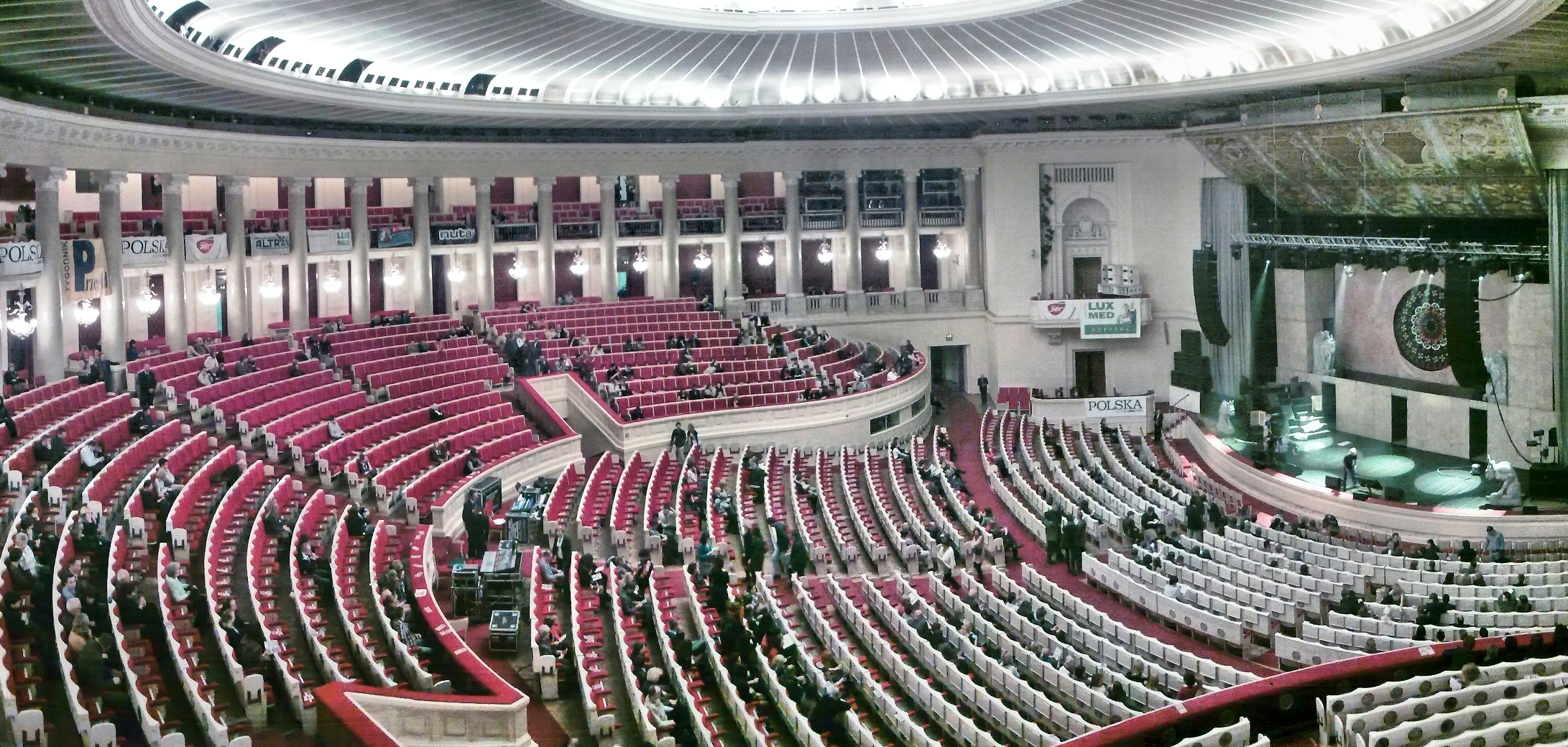 Sala Kongresowa w Warszawie.